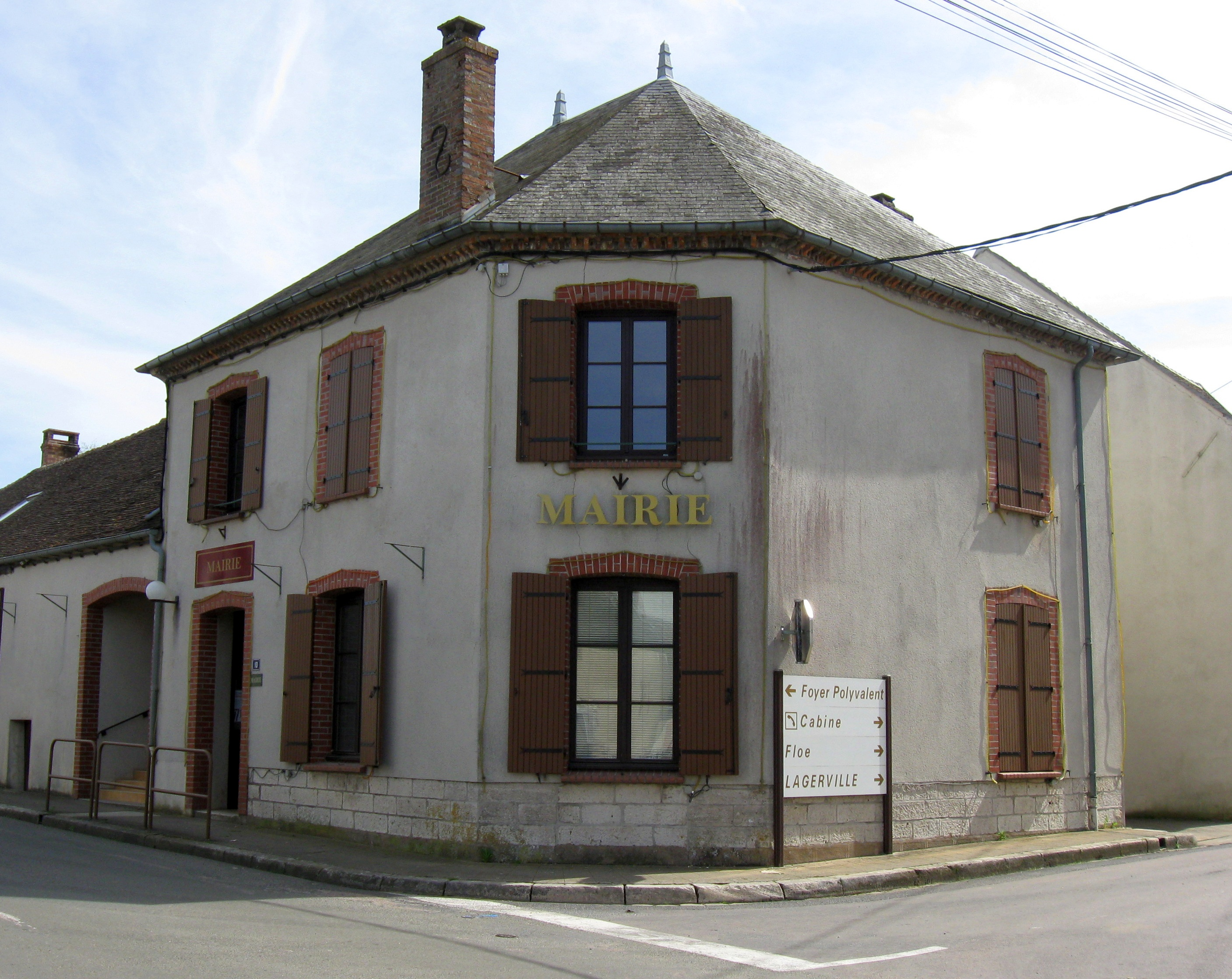 Mairie de Chaintreaux. (Seine-et-Marne, région Île-de-France).